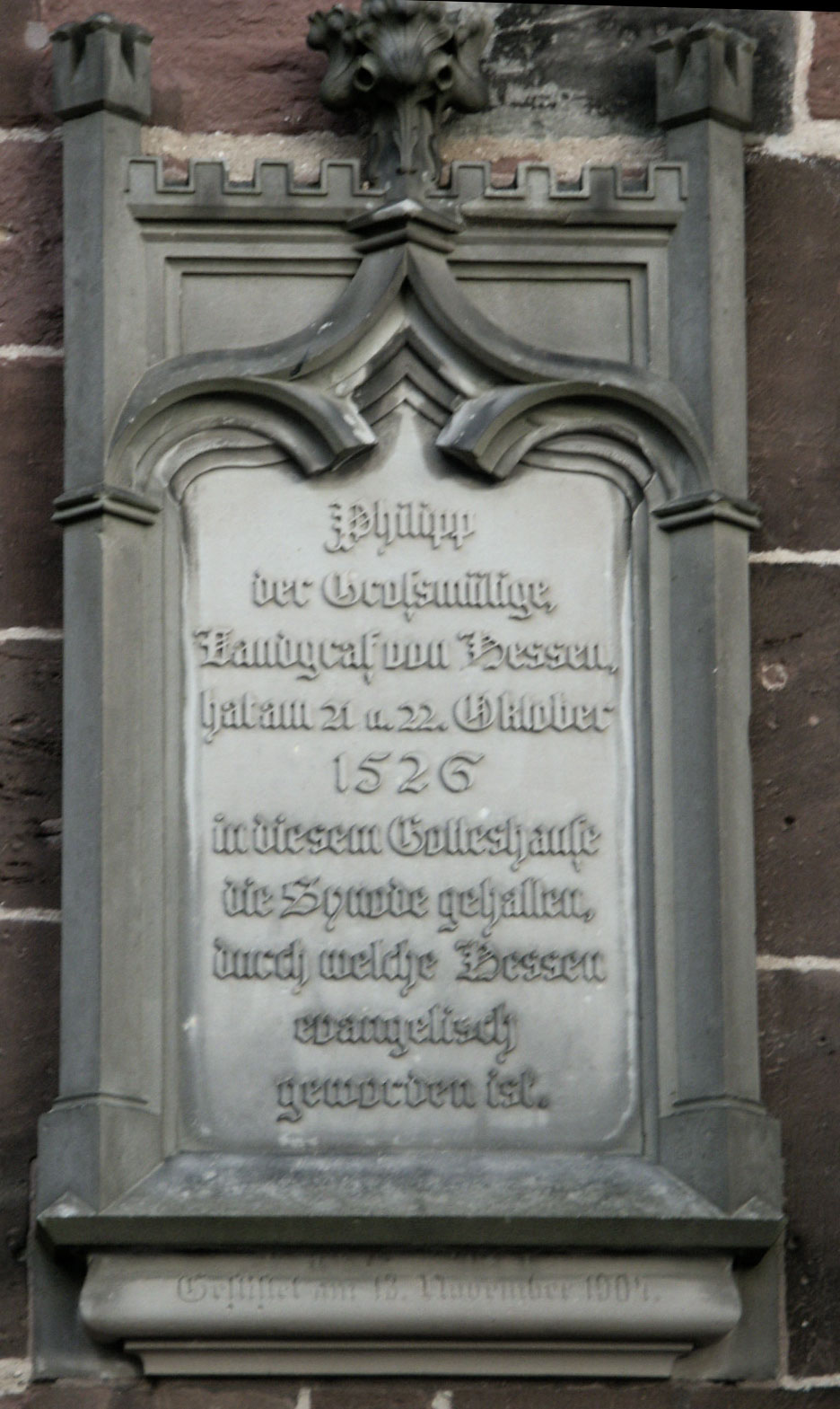 HombergerSynodeGedenktafel Text Philipp der Großmütige, Landgraf von Hessen, hat am 21. u. 22. Oktober 1526 in diesem Gotteshause die Synode gehalten, durch welche Hessen evangelisch geworden ist.